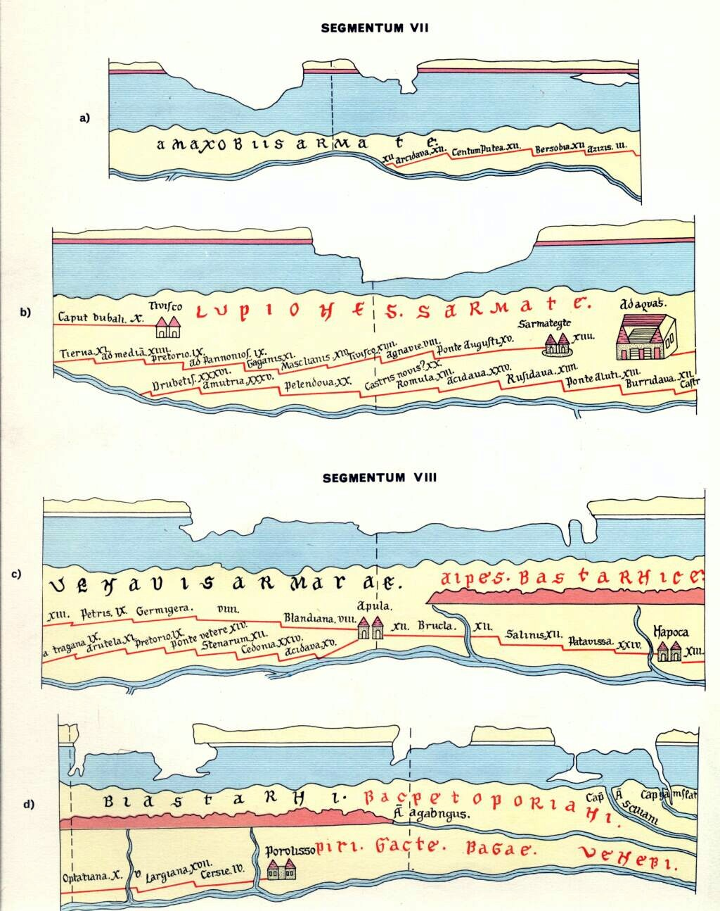 Tabula Peutingeriana (Segmentum VII + VIII), Dacia (modern Romania)